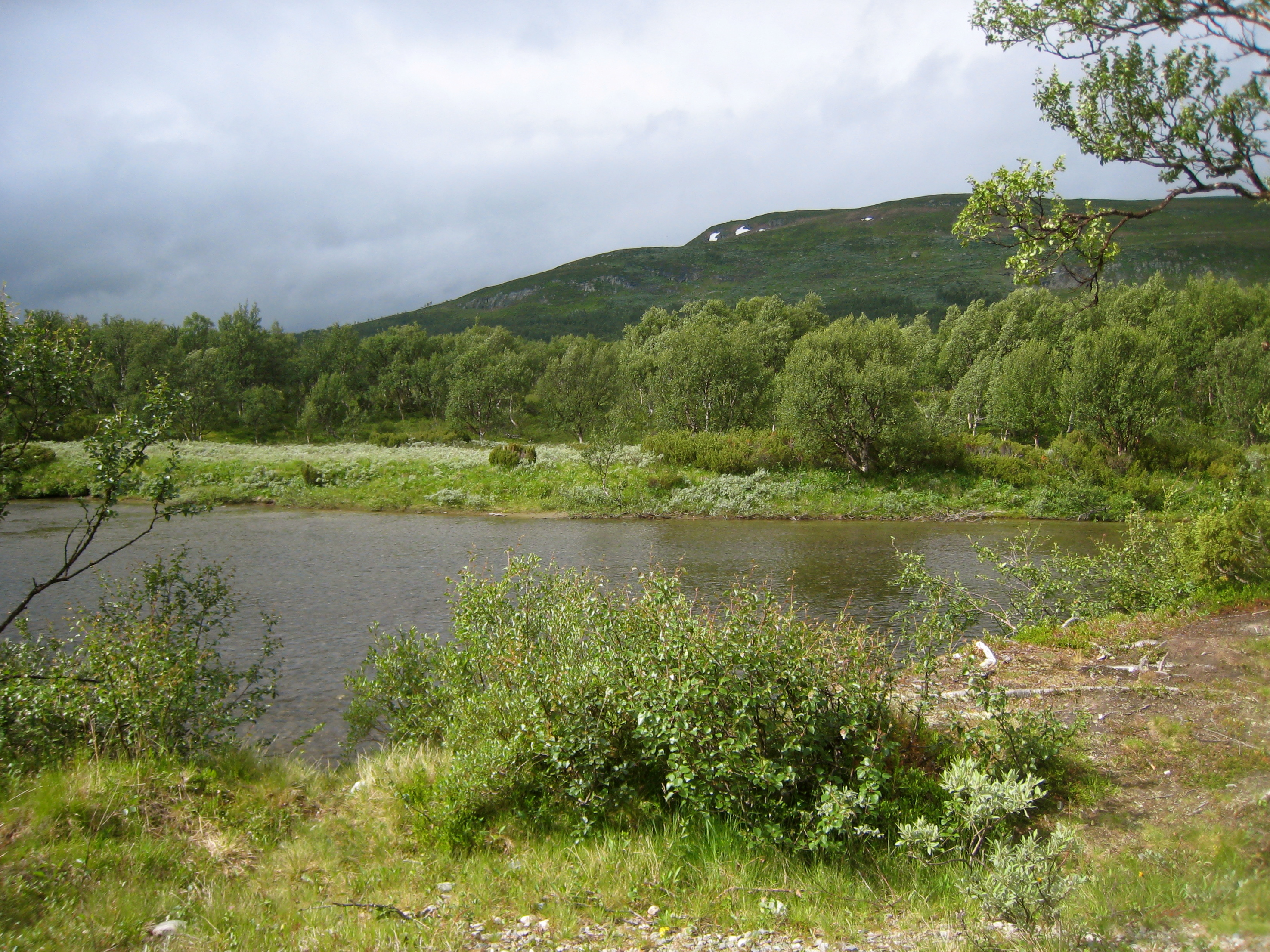 Ljungan. Fotot är taget vid den översta delen av Ljungan, mellan Ljungdalen och Ljungris.